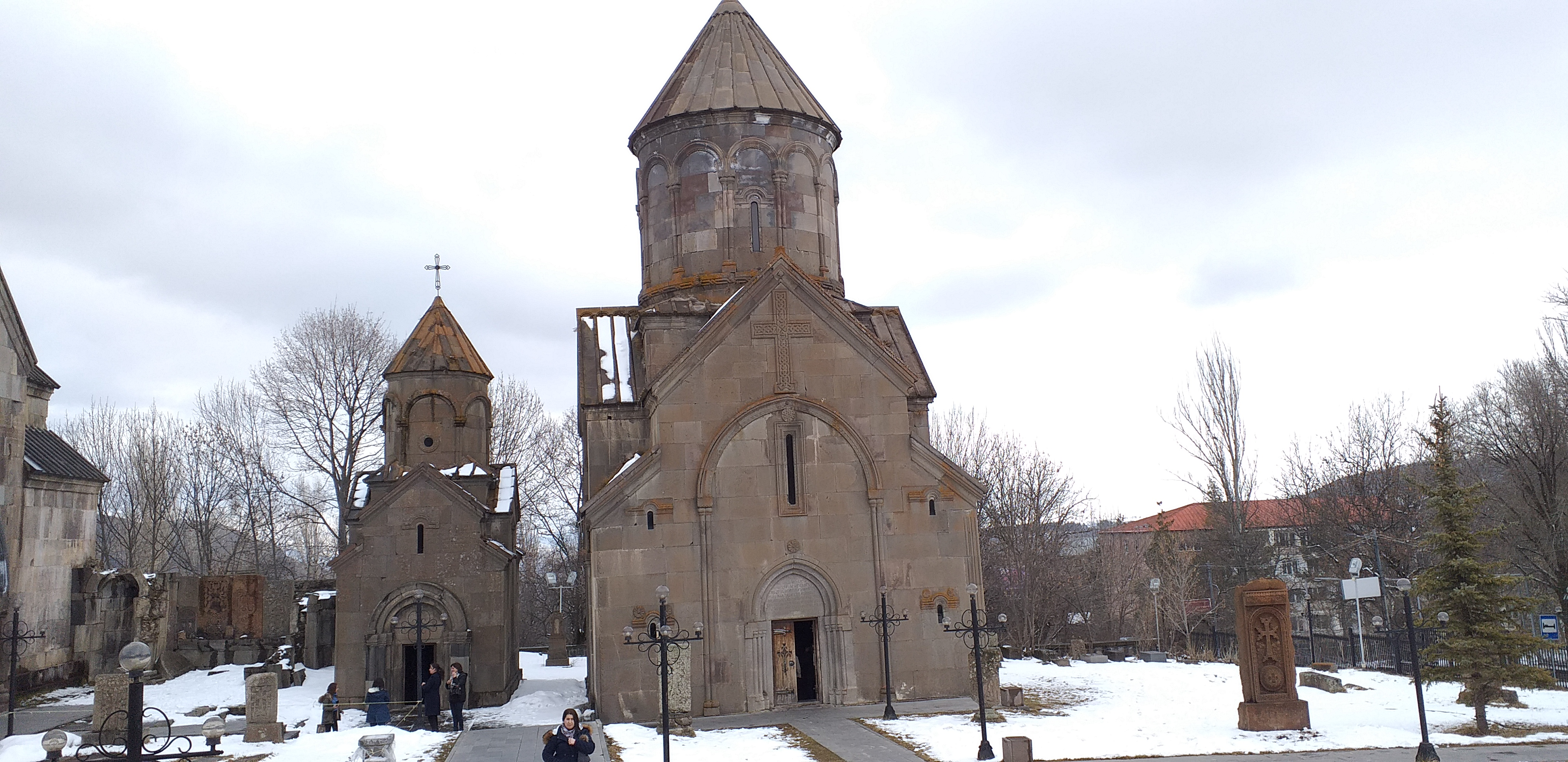 Կեչառիսի վանական համալիր